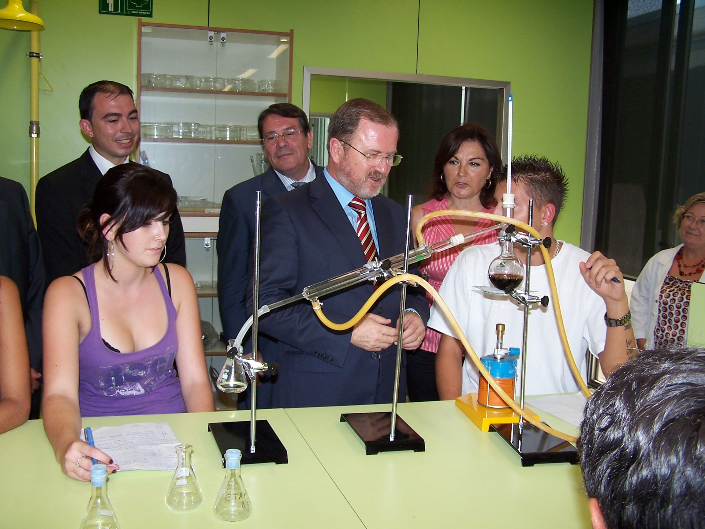 Inaguració de l'IES Mediterráneo. Al centre de la imatge el Conseller d'Educació: Alejandro Font de Mora. Darrere d'ell l'alcalde de Torrevieja Pedro Hernández Mateo.